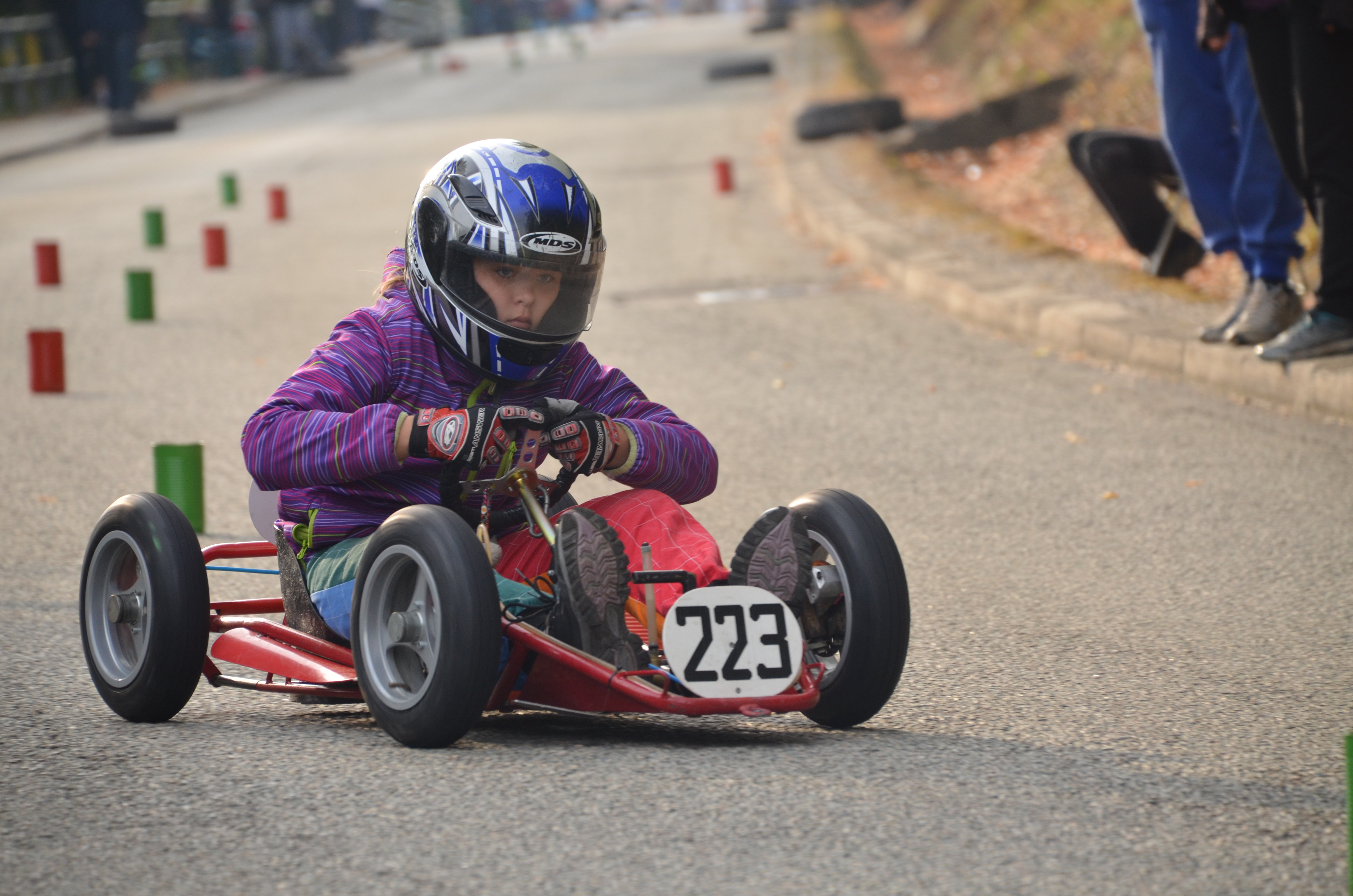 13. kolo poháru České republiky konané v Adamově 24. - 25. září 2016Berenika Švajdová (kategorie M2) jezdící za klub MINIKÁR TEAM Mimoň v AČR